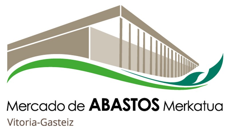 Nueva imagen de marca de Mercado de Abastos Merkatua con el denominativo de ciudad: Vitoria-Gasteiz